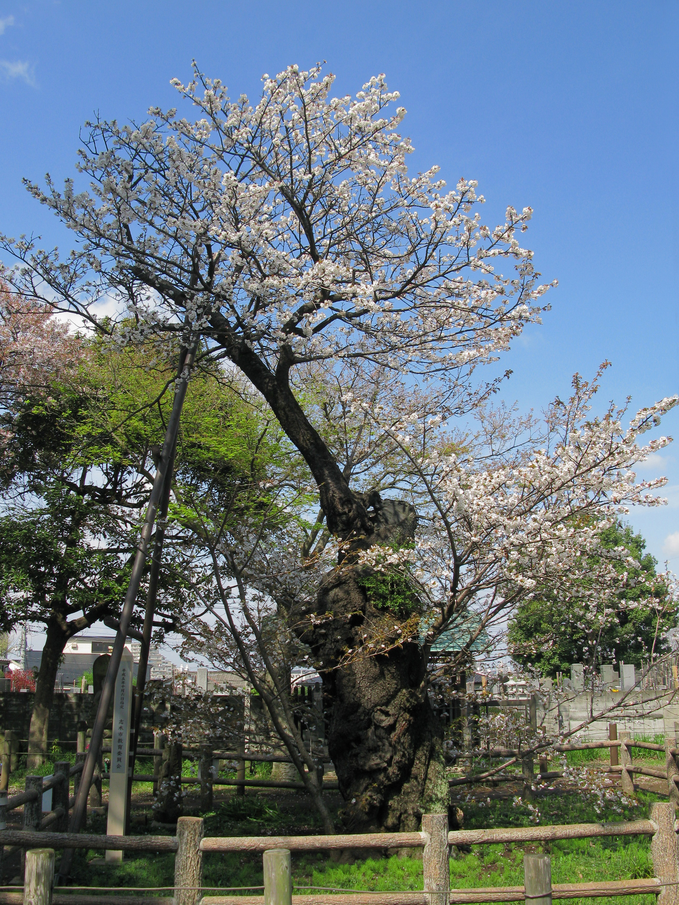 チョウショウインハタザクラ 全景（埼玉県志木市）